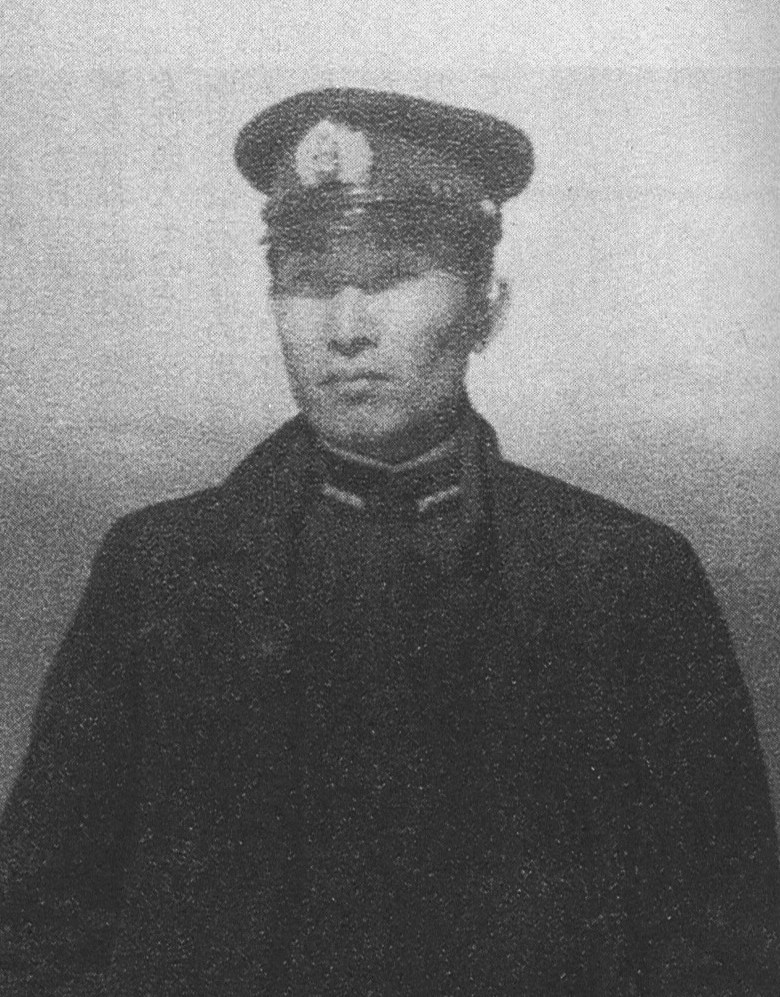 黒澤丈夫。1942年11月、大村空時代、雲仙にて。